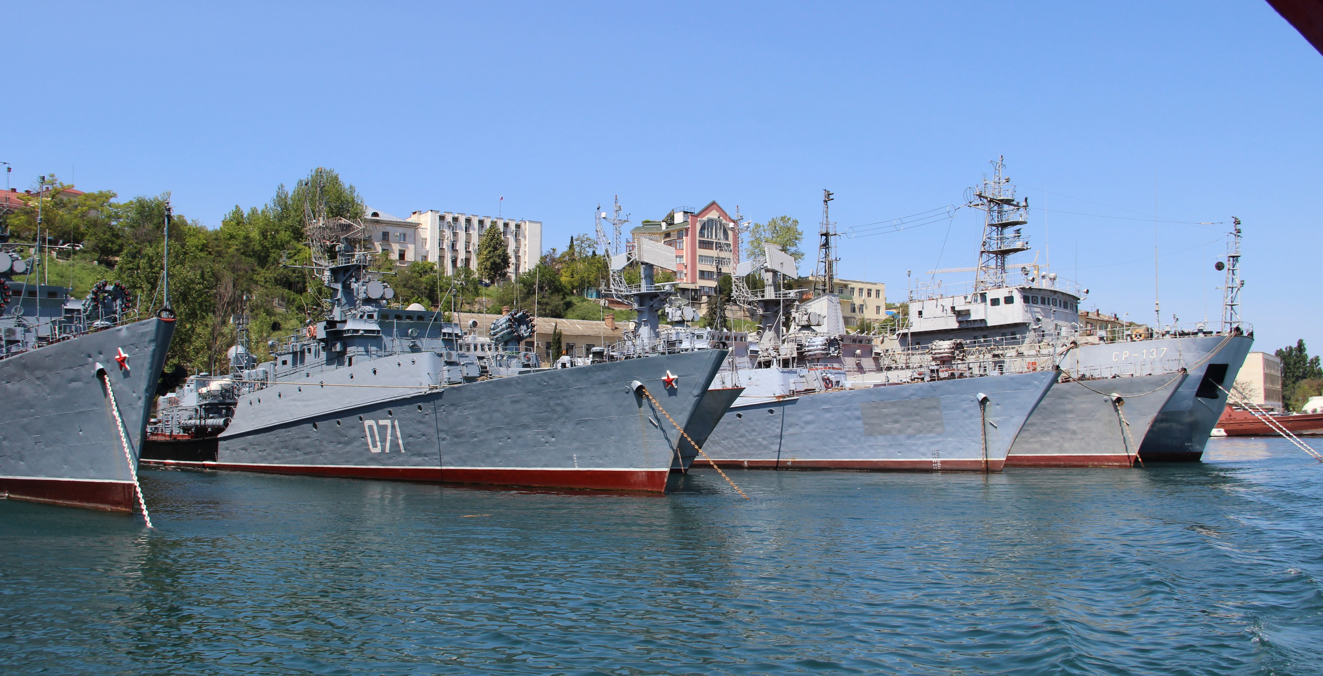 149-я тактическая группа противолодочных кораблей 68-й бригады кораблей охраны водного района (в/ч 49932). Севастополь. Крым. Россия. Май 2015